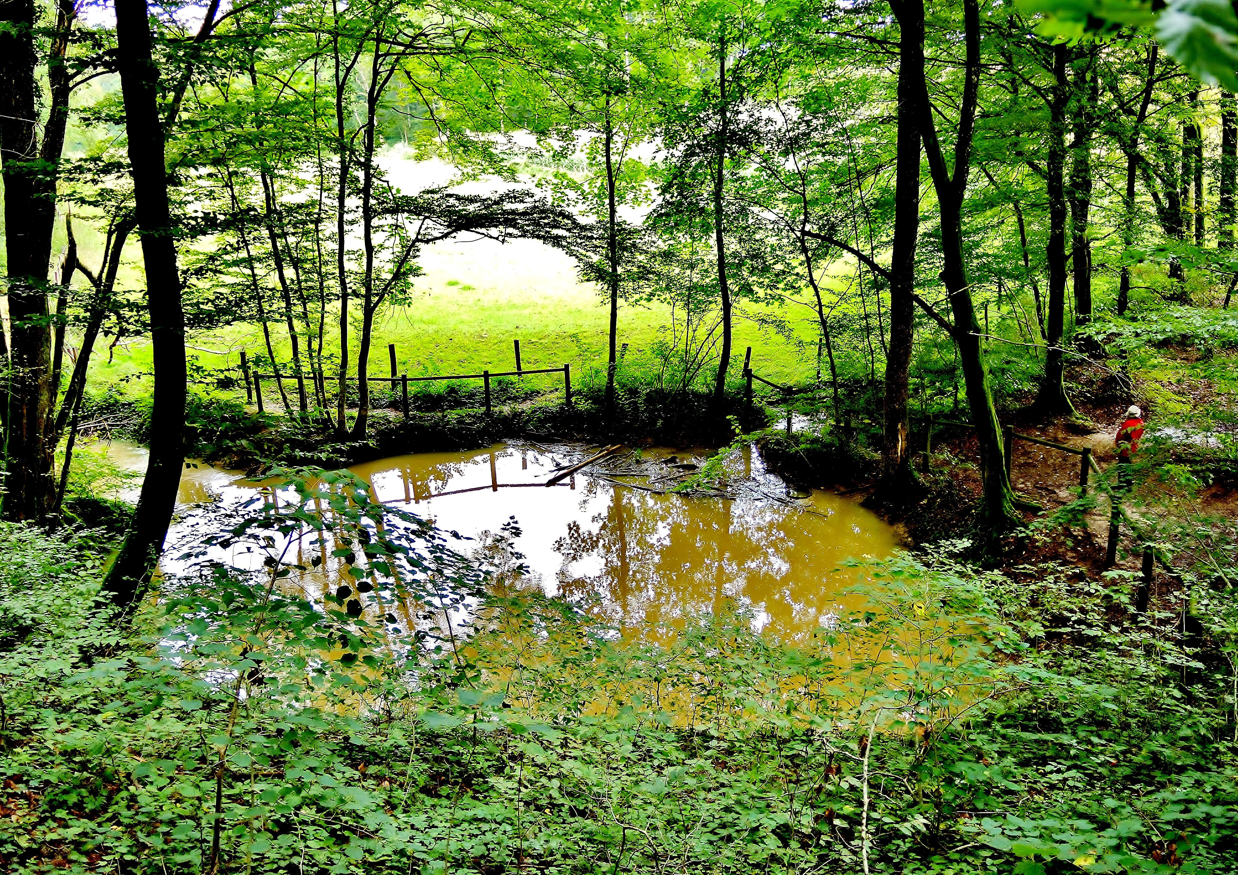 Creux ,de Malfosse. Eruption phréatique. Badevel. Doubs